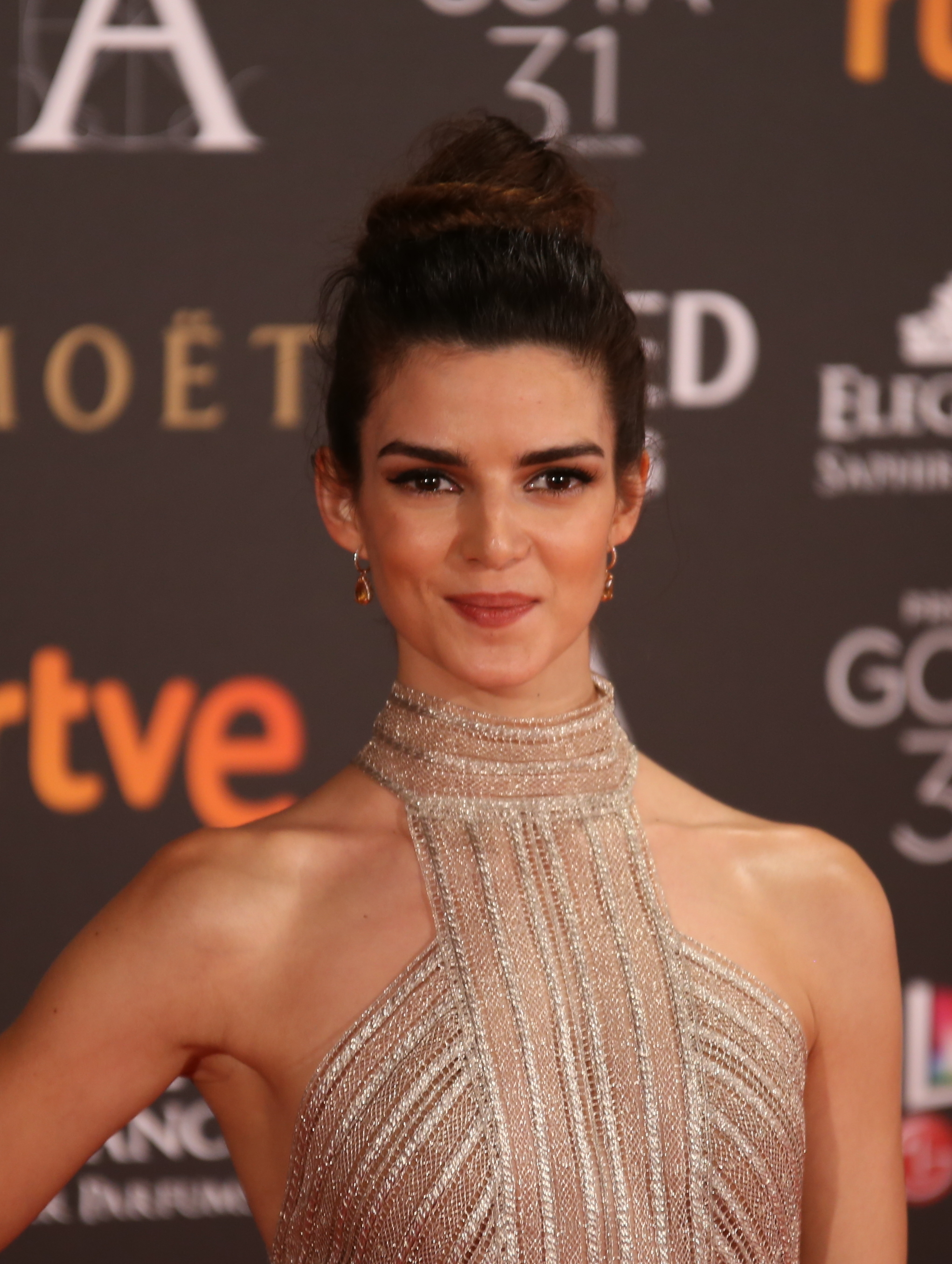 Premios Goya 2017